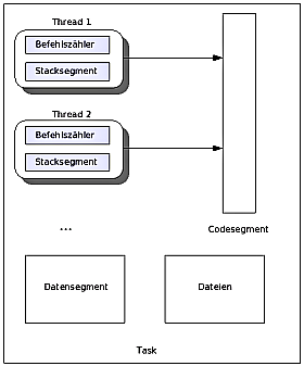 Threads